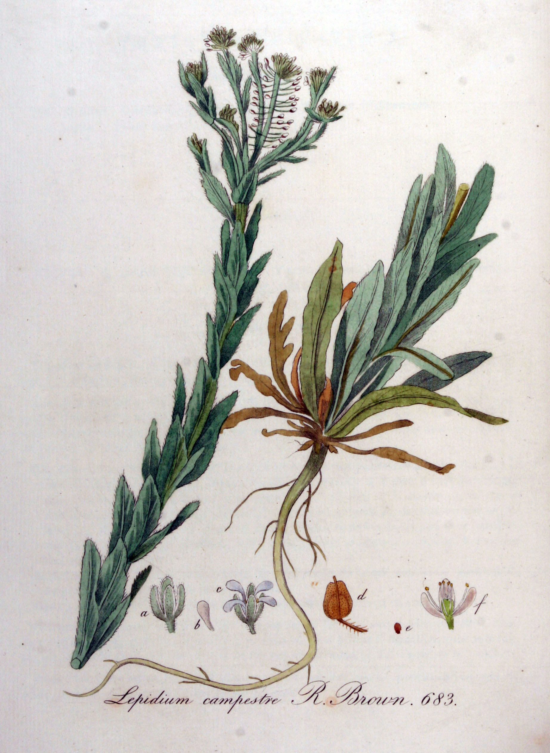 Lepidium campestre (L.) R. Brown